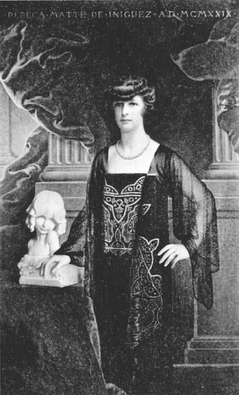 Oleo pintado por Corcos en Florencia en el que retrata a Rebeca Matte Bello (1875–1929) DescriptionChilean sculptorDate of birth/death29 October 187514 May 1929Location of birth/deathSantiagoFlorenceWork period1900s-1920sWork locationItaly, Paris, ChileAuthority control : Q3338913 VIAF: 78661432 ISNI: 0000 0000 6709 0478 ULAN: 500034429 LCCN: nr94025237 RKD: 467974 WorldCat junto a la escultura que ella hizo de su hija Lily Íñiguez en 1904, en Santiago.